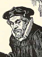 Mikael Agricola